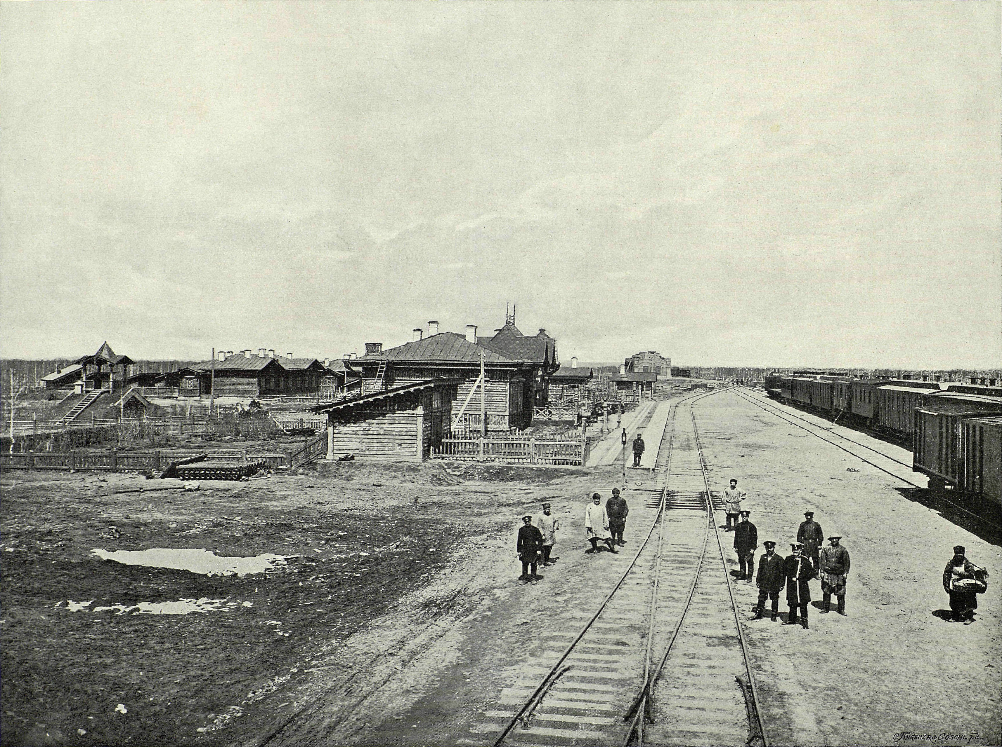 Общий вид станции Томск (ныне Томск-II)